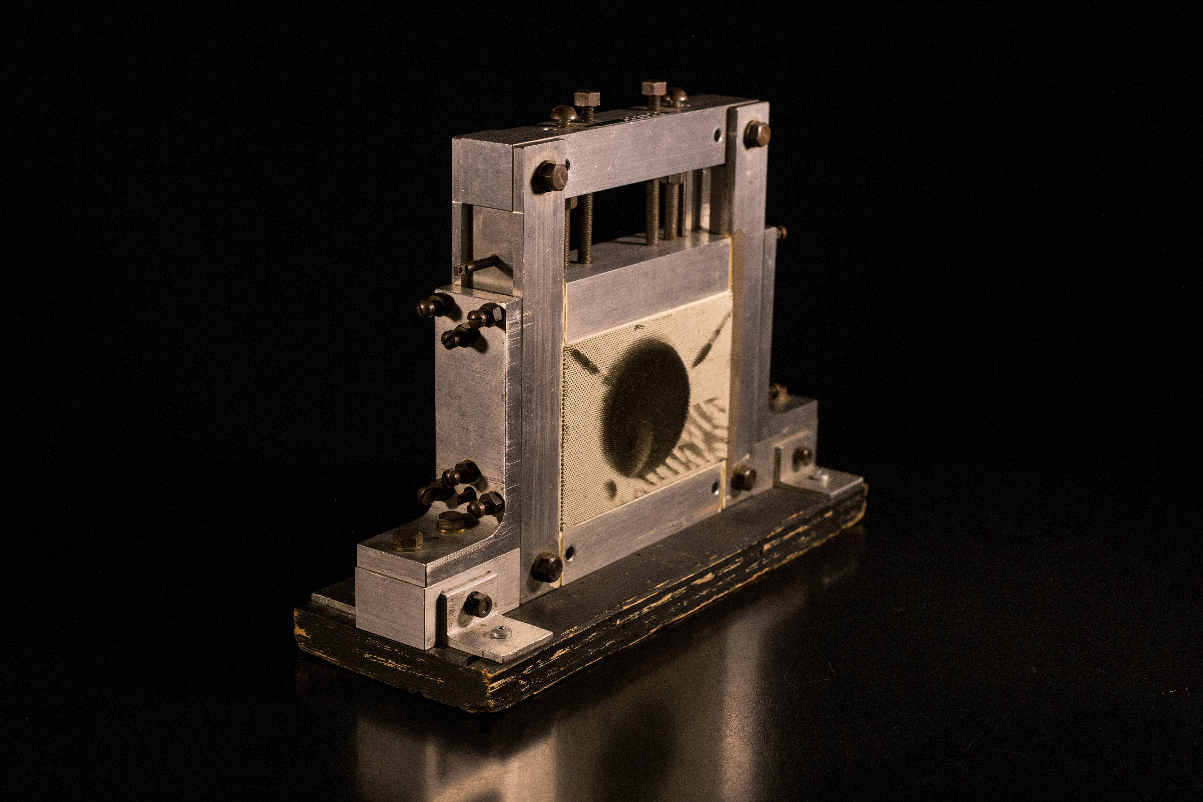 Écran d'épingles Baby Screen servant à la réalisation de films d'animation. Photo prise à la Médiathèque Guy-L.-Coté de la Cinémathèque québécoise.